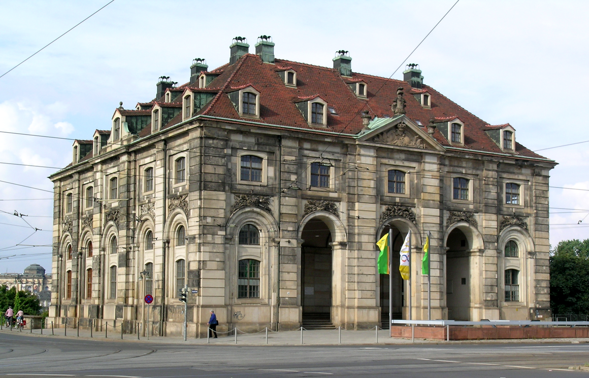 Blockhaus, Augustusbrücke/Meissner Str., Dresden, Germany. 1732-1755.